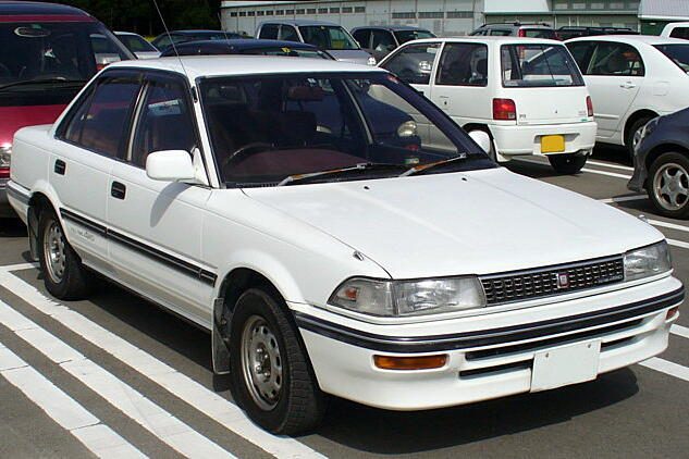 トヨタ・カローラ（E90系・後期型）